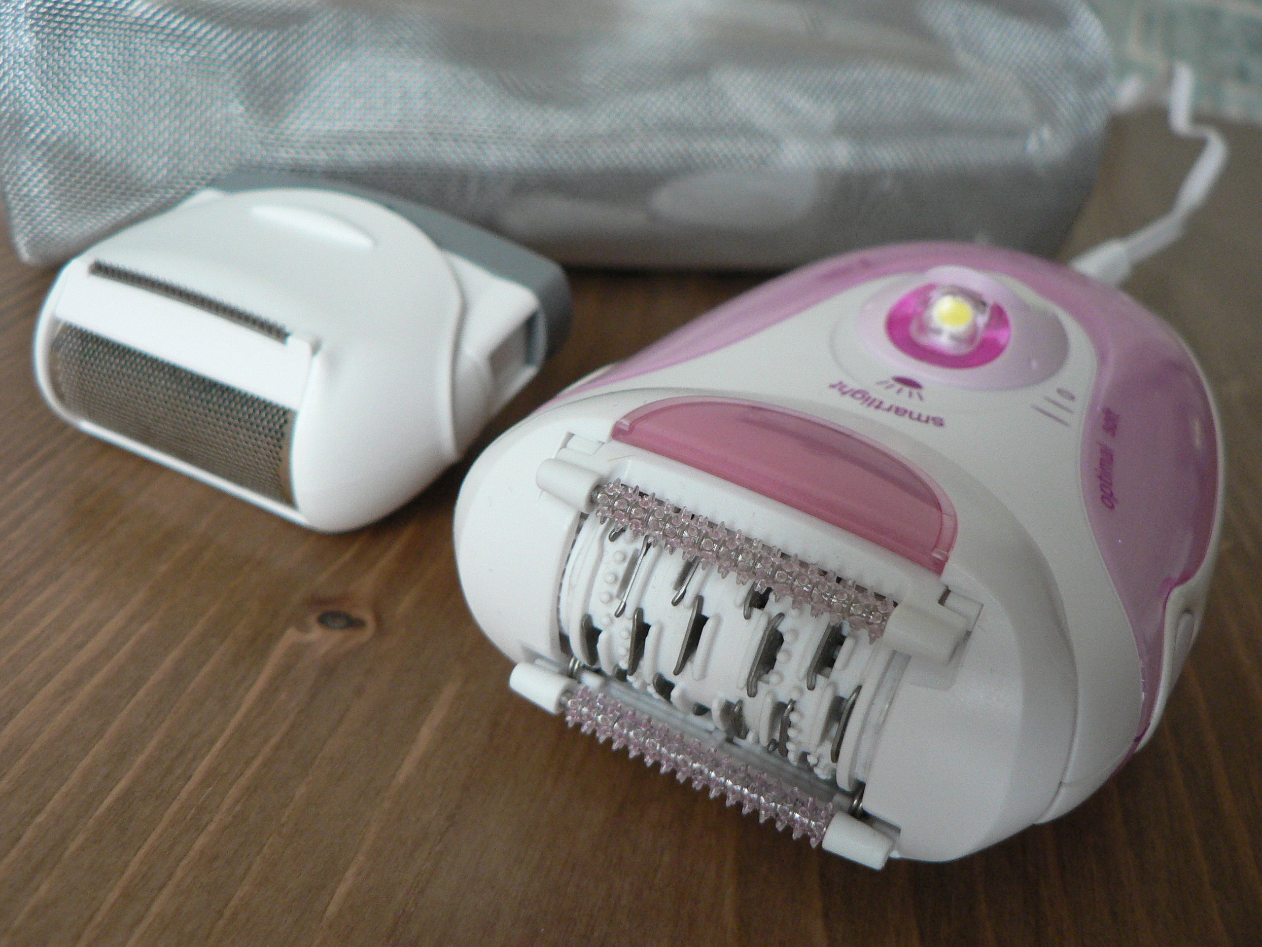 epilady Braun 5270 x'elle body system - Antwerpen € 90